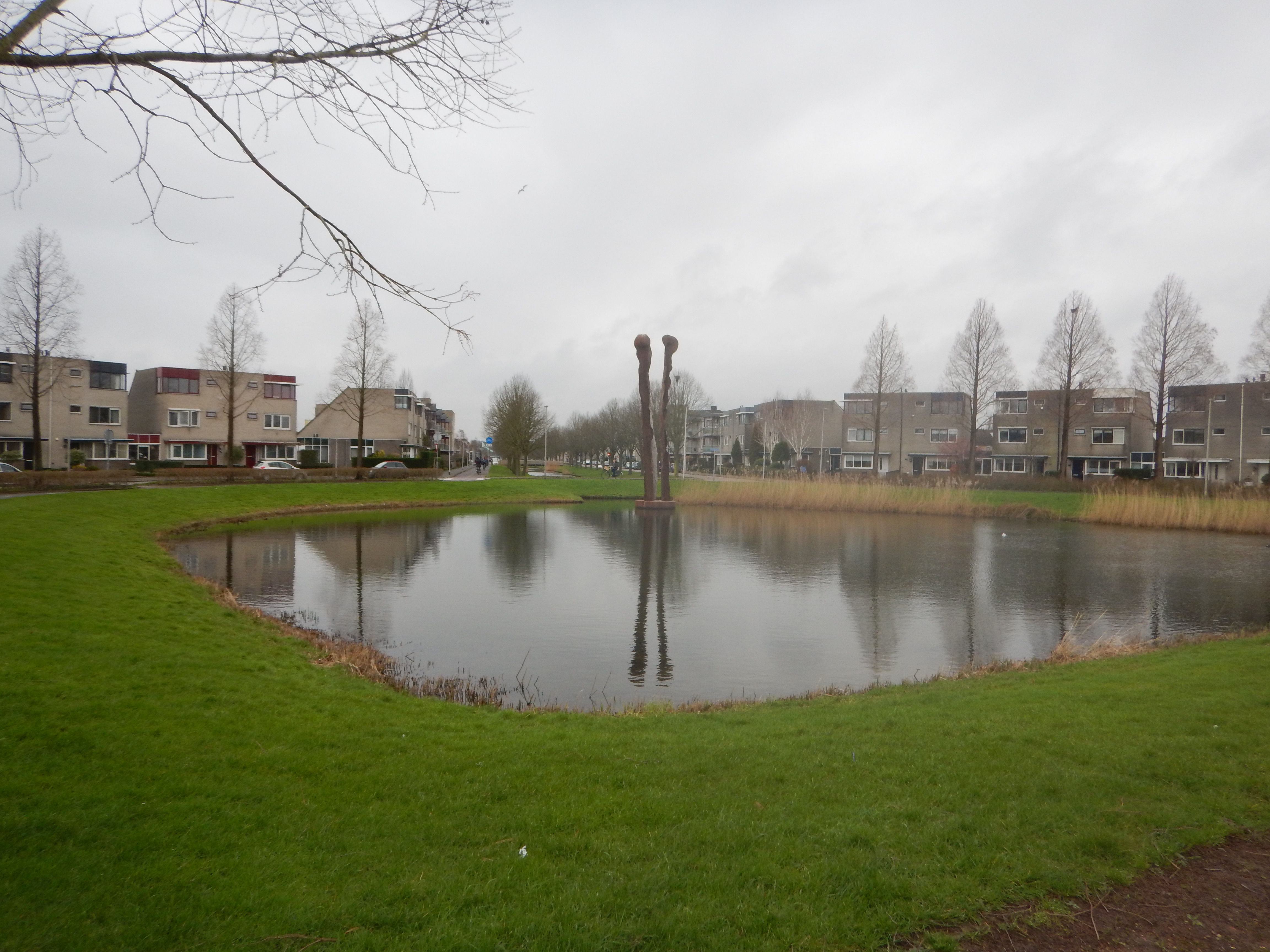 Grasveld en vijver bij Strausslaan